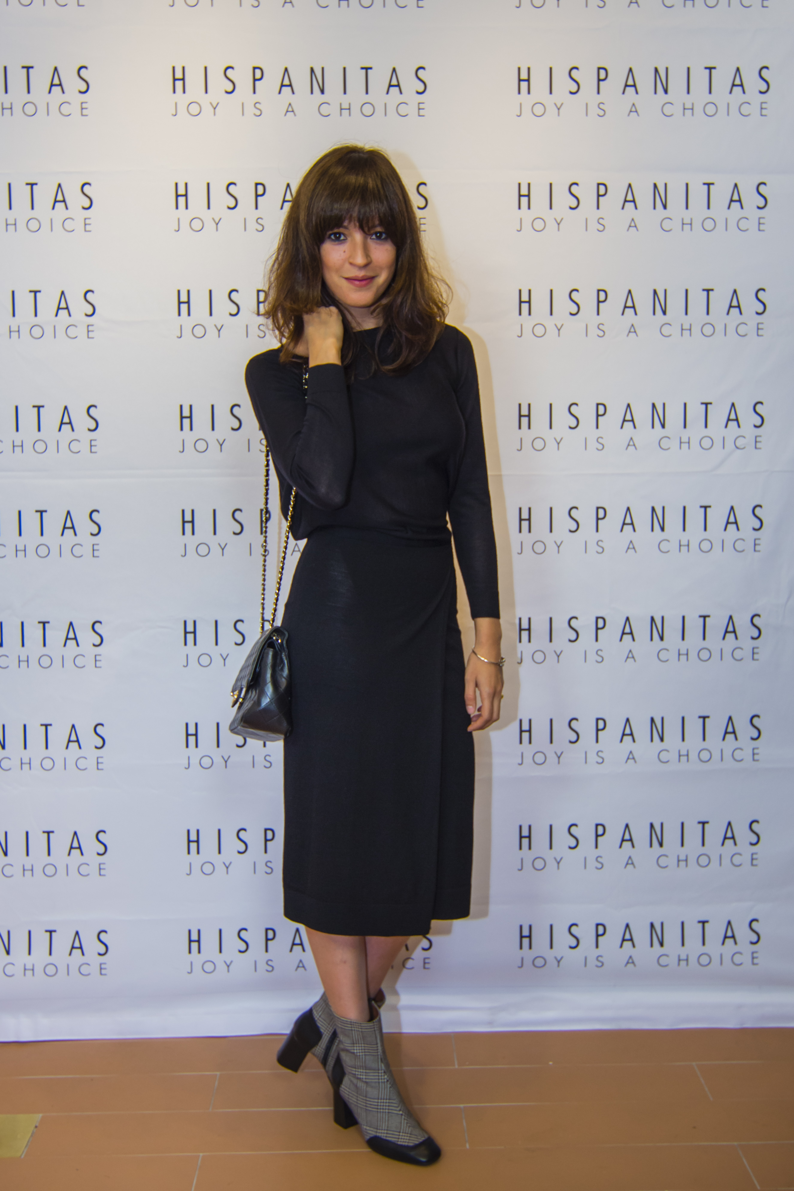 Verónica Sánchez en la inauguración de la tienda de Hispanitas en la calle Velázquez de Madrid (20 de octubre de 2016)